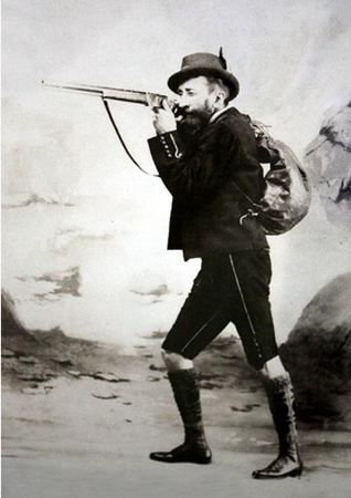 Беларуская (тарашкевіца): Бэнэдыкт Тышкевіч. Аўтапартрэт